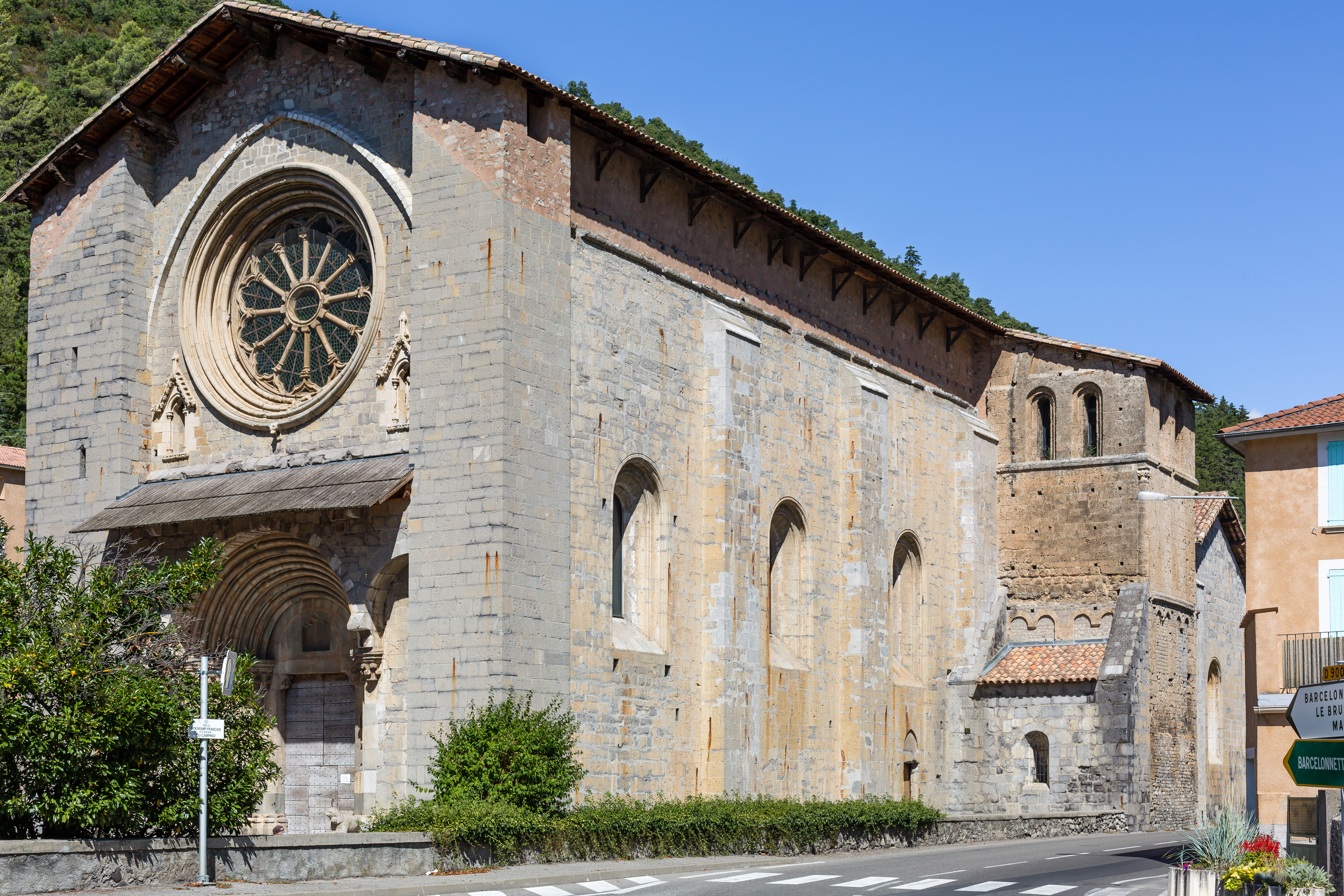 Extérieur de la cathédrale Notre-Dame-du-Bourg de Digne-les-Bains (France).